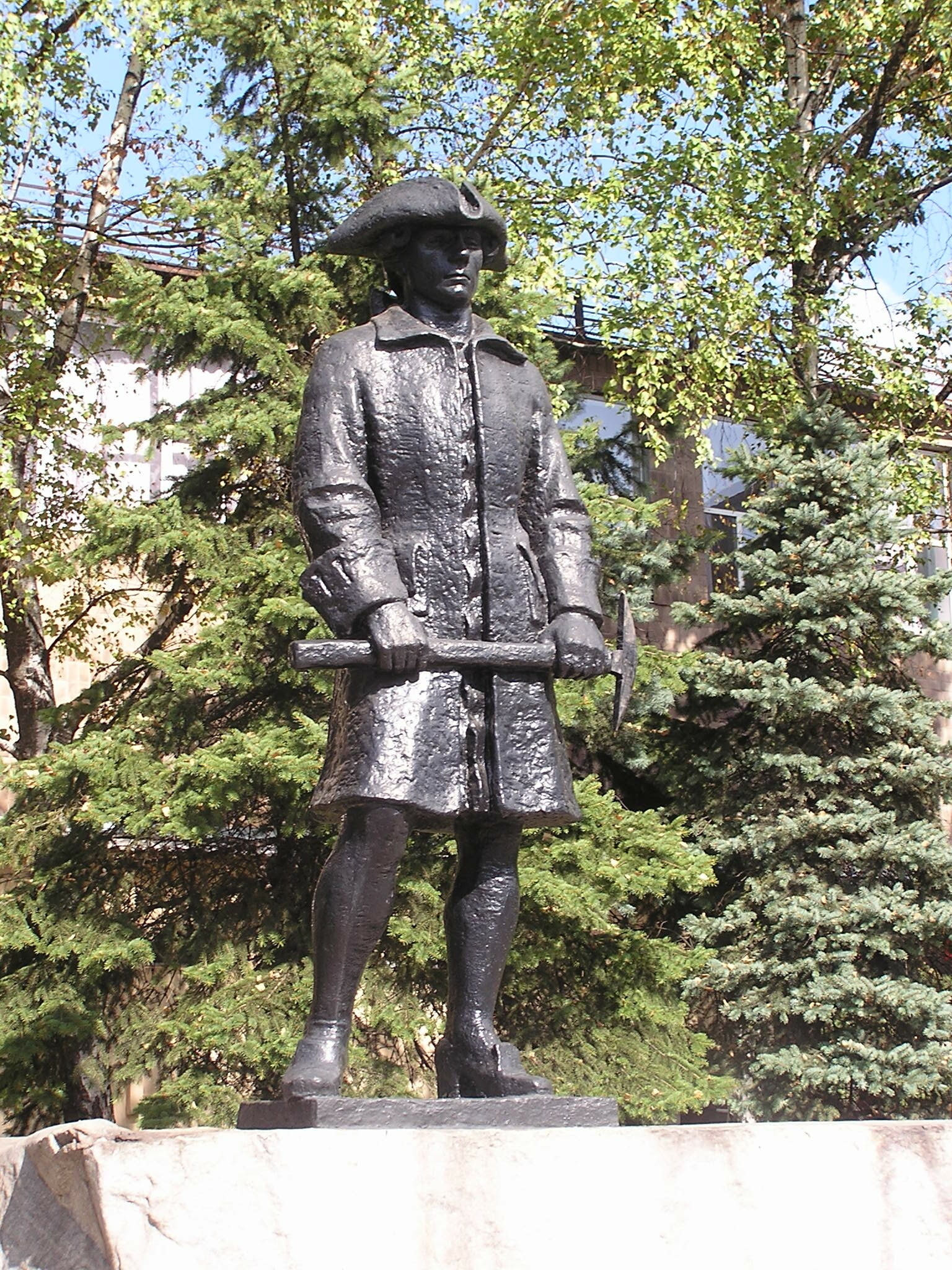 Макеевка